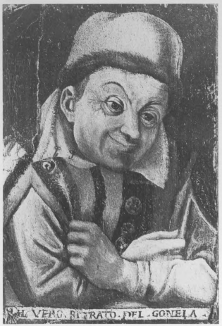 Копия картины "Портрет Гонеллы, придворного шута Феррары", приписываемой Жану Фуке (ок. 1421-1480). 17 в. Частное собрание, Феррара